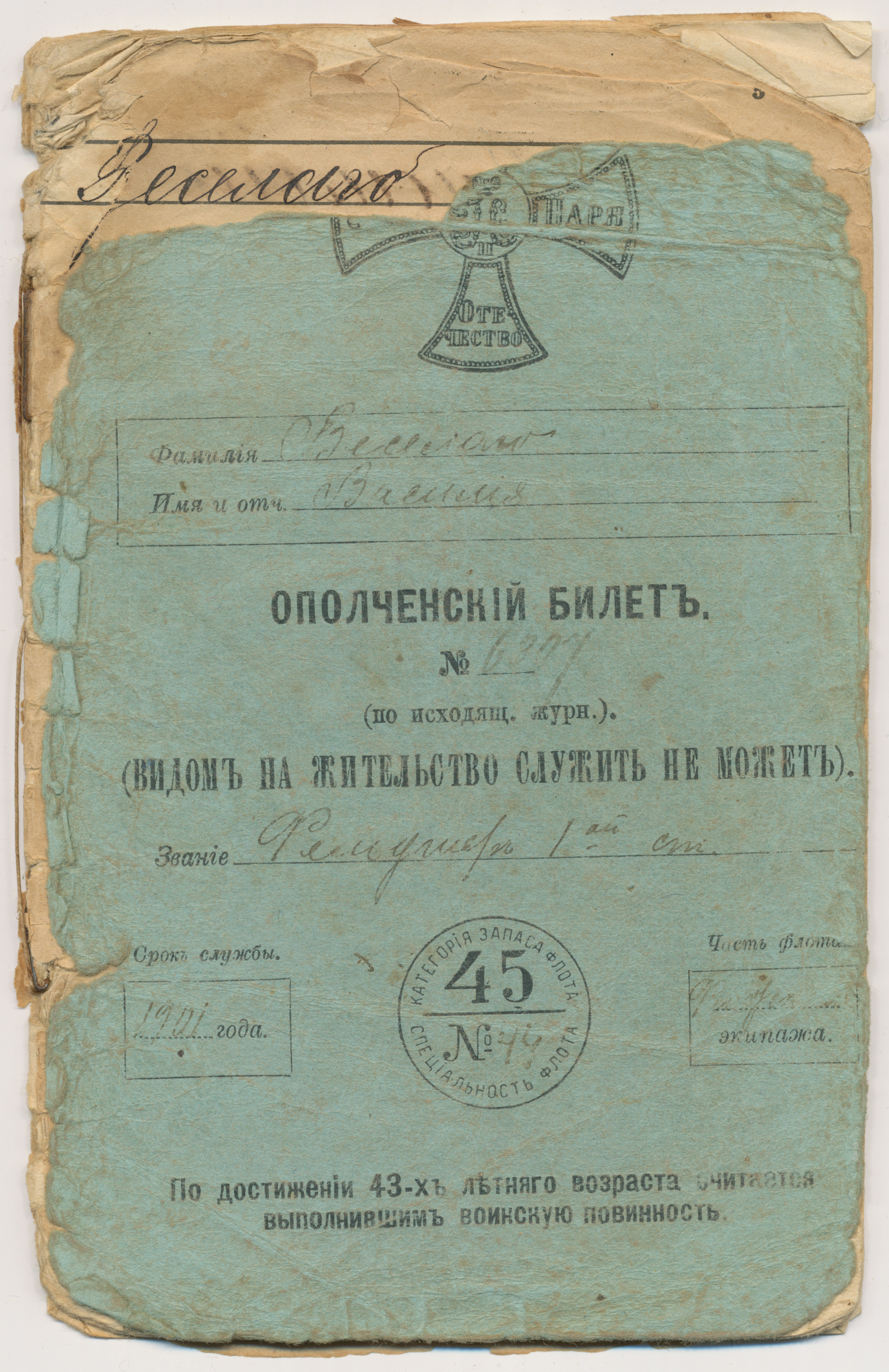 Ополченский билет № 6307 (1910 г.) Василия Веселаго (обложка)